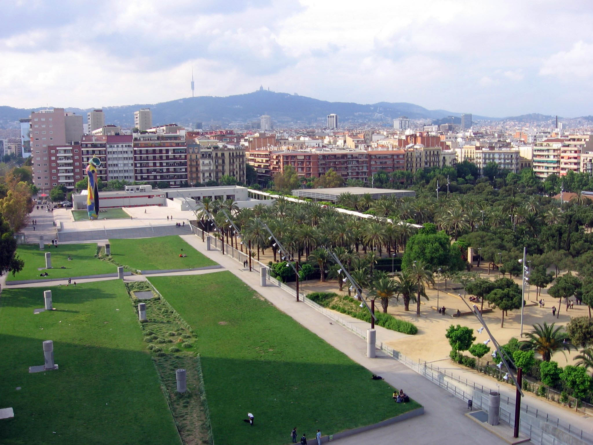 Parque de Joan Miró.